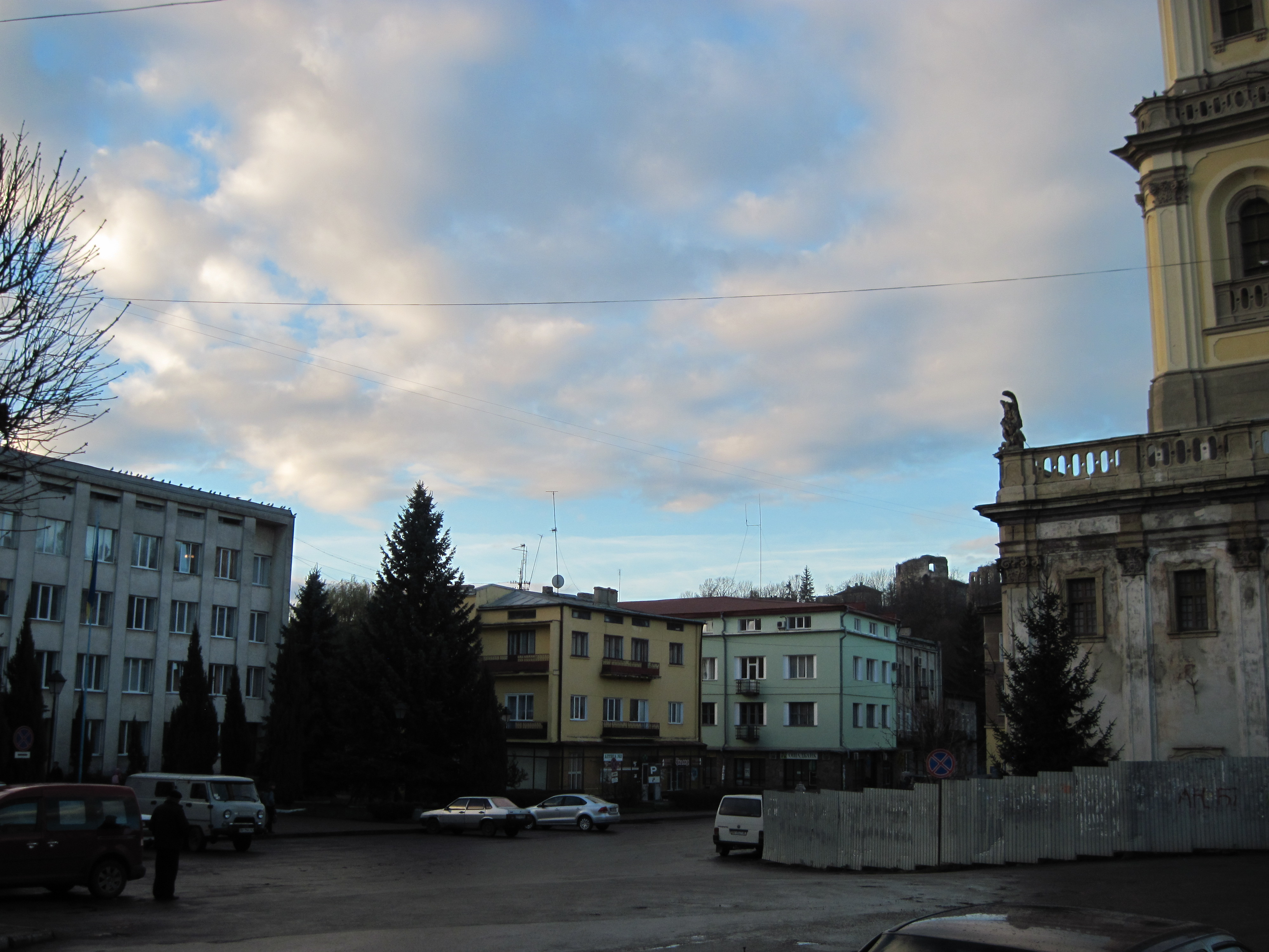 Майдан Волі. Бучач, осінь 2013